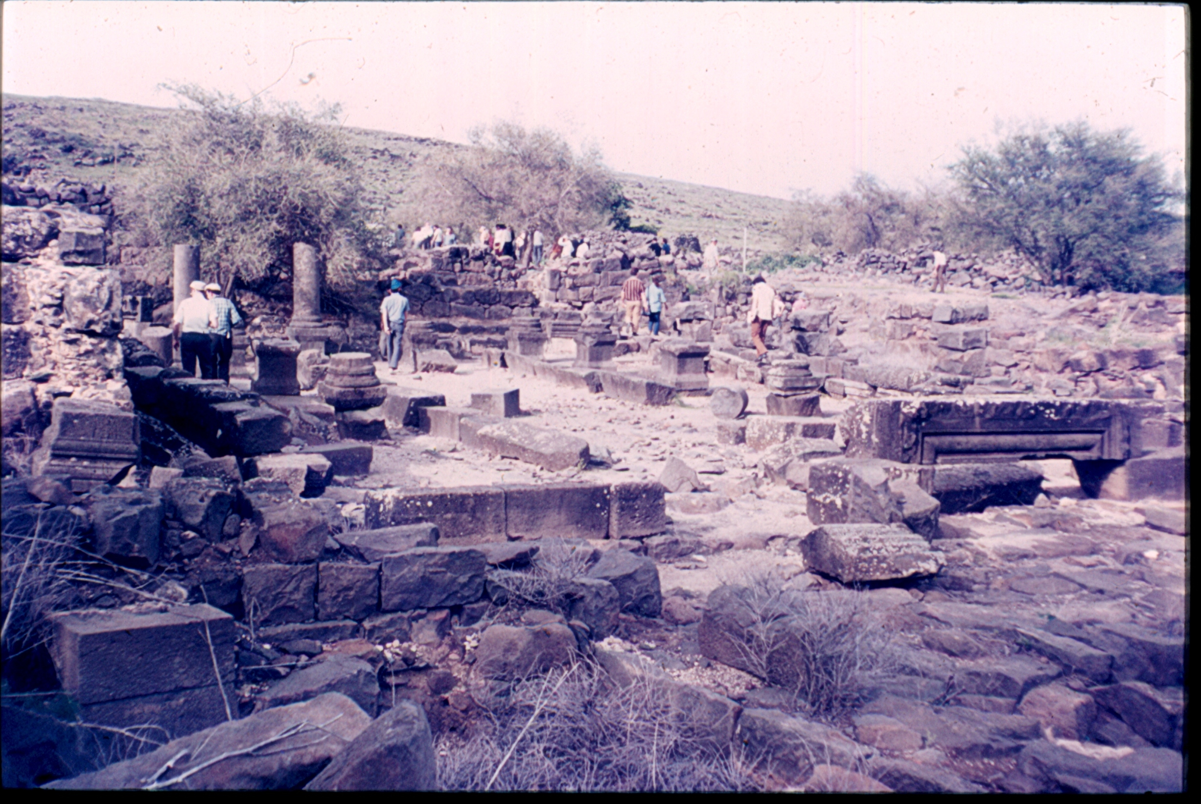 Corazim_synagogue